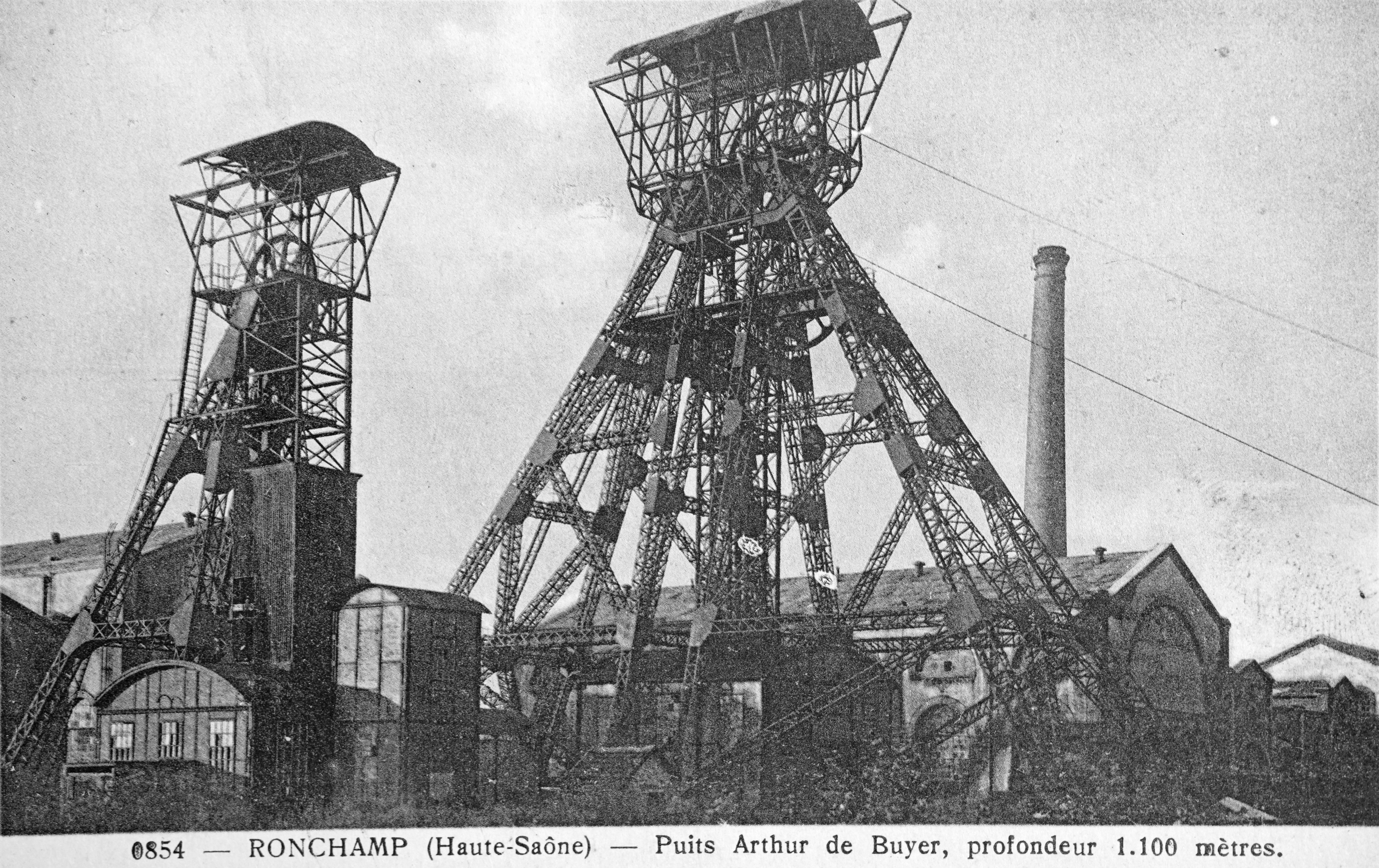 Le puits Arthur-de-Buyer après 1928 avec le chevalement double.